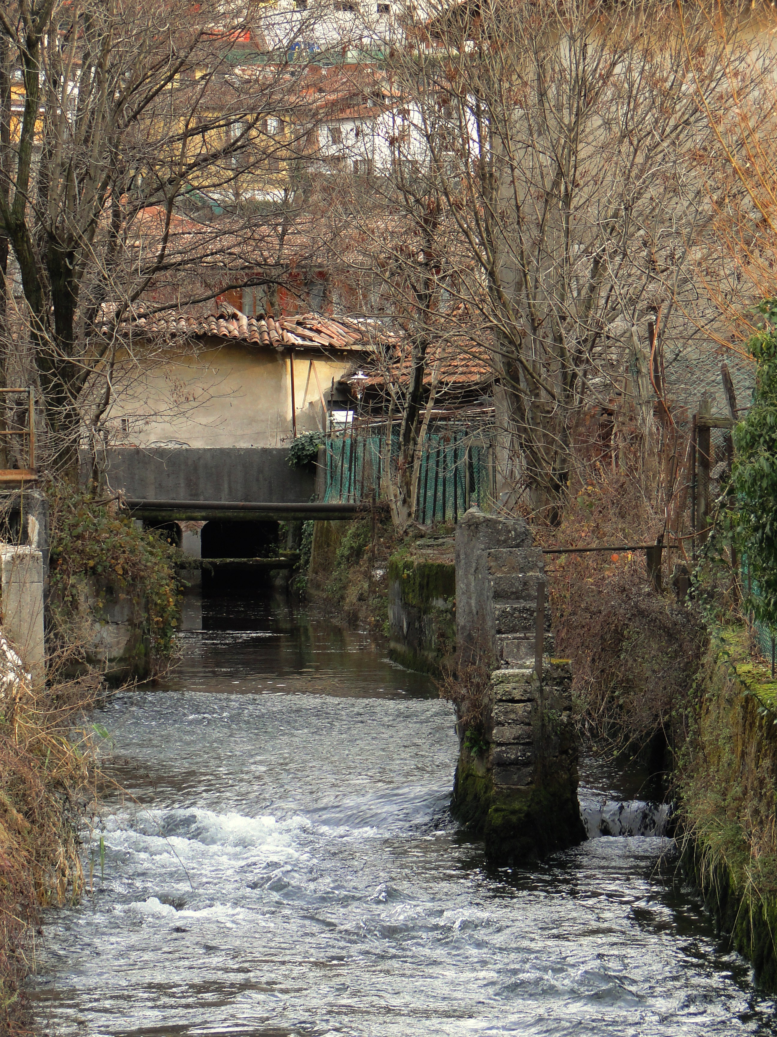 La roggia Morlana nei pressi delle vecchie bocche di presa, Nembro (BG)